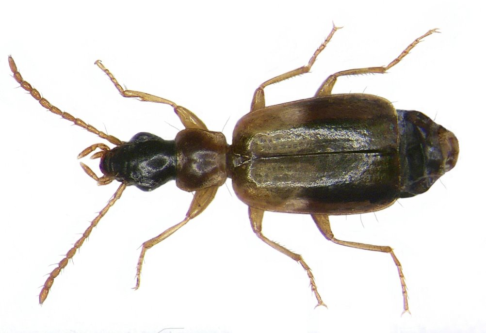 Familie: Carabidae Grösse: 2,5-3,7 mm Verbreitung: Europa bis Zentralasien Ökologie: wärmeliebende Art, die trockene Habitate bevorzugt Fundort: Germania, Bayern, Oberfranken, Selbitz leg.det. U.Schmidt, 2005 Foto: U.Schmidt, 2007